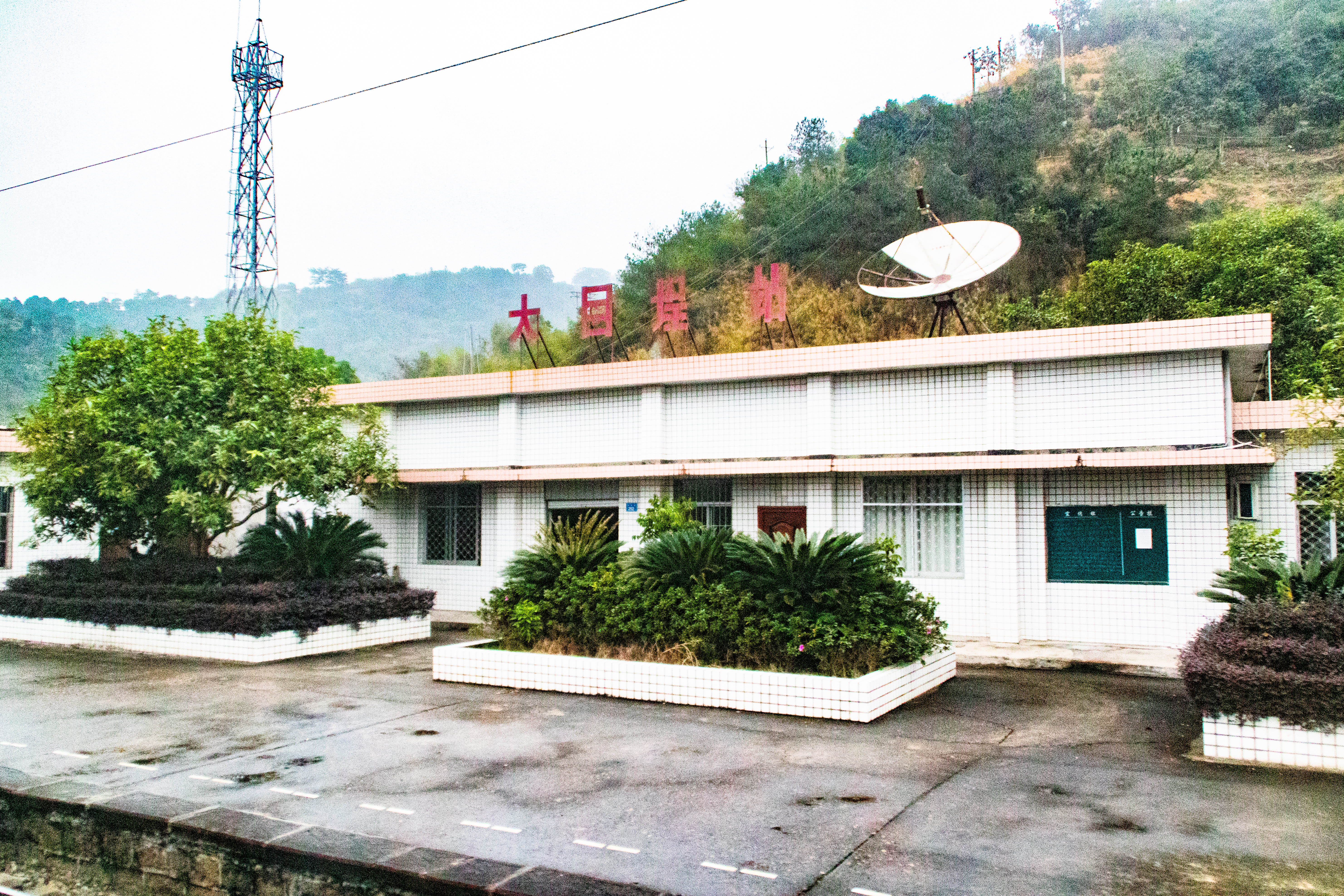 中文（中国大陆）: 峰福铁路大目埕站